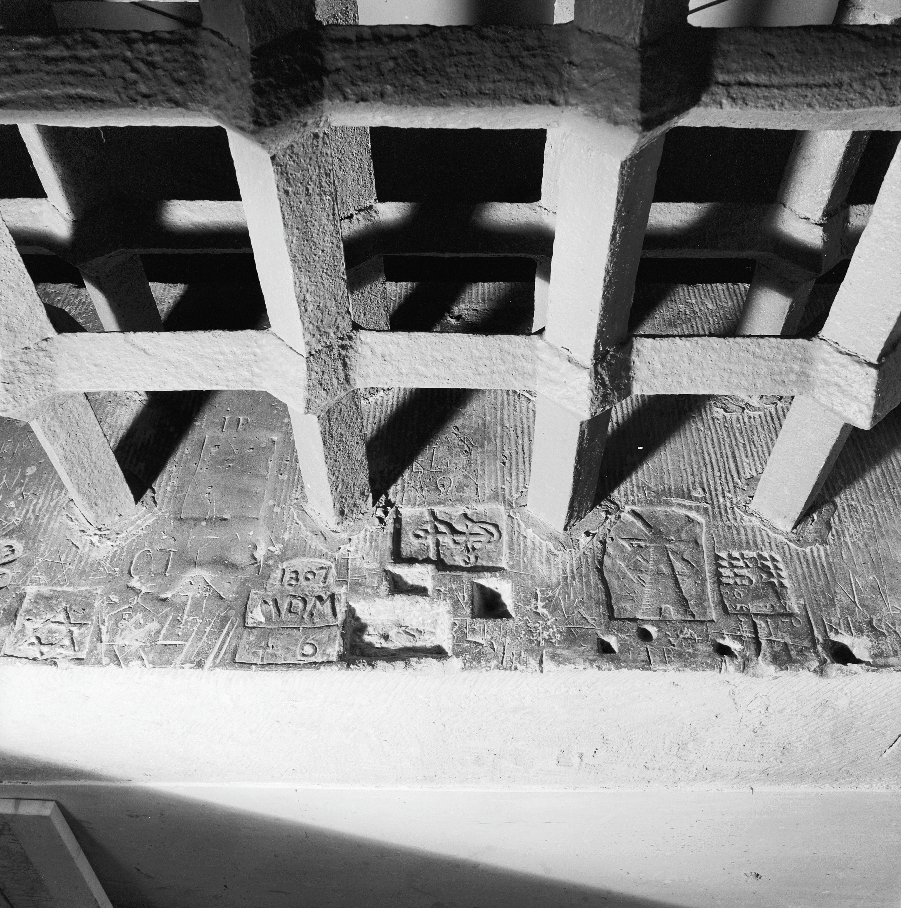 v.m. Raadhuis Paleis oude tekeningen en gravures: inscriptie's in cellen in kelder